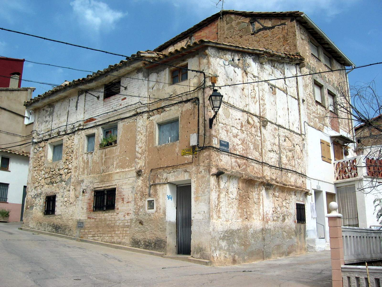 Detalle de arquitectura tradicional (vernacular) en Casasaltas (Valencia), año 2003.